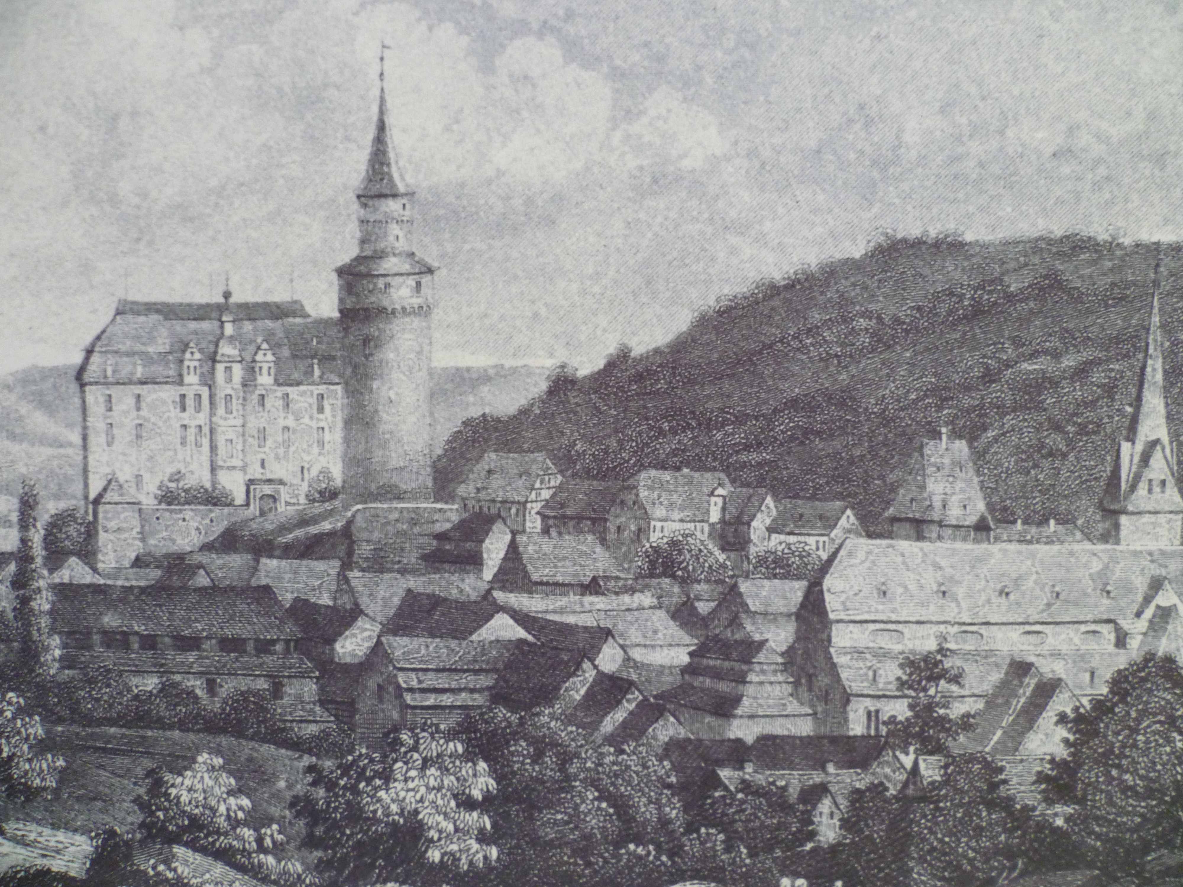 Bild Idsteins abfotografiert in einer Ausstellung des Stadtmuseums Hofheim. Es zeigt einen Stahlstich von 1835.